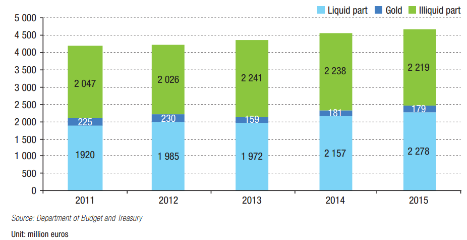 Конституционный Резервный Фонд Монако